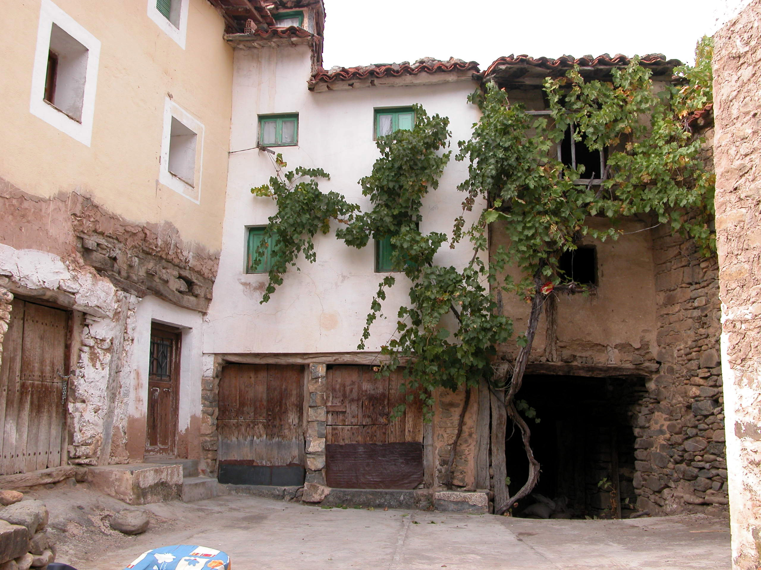 Las Ruedas de Enciso. Aldea de Enciso, La Rioja (España).